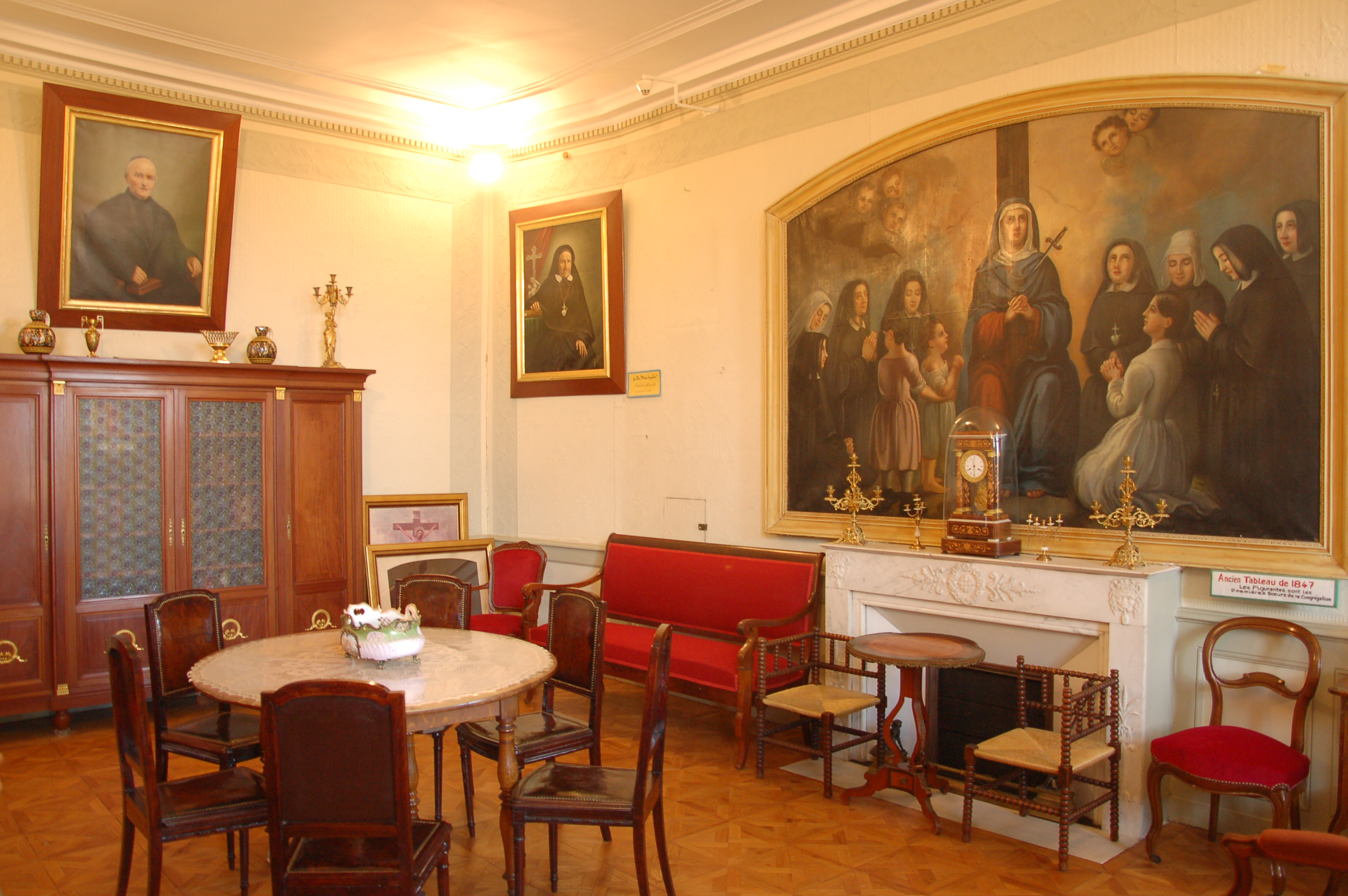 Les sœurs de Notre-Dame de la Compassion sont une congrégation religieuse catholique créée par le Père Barthès à Marseille au XIXème siècle.Leur maison mère se trouve dans le XIIème arrondissement de Marseille, dans l'Allée de la Compassion, autrefois le domaine de la famille Blancard.